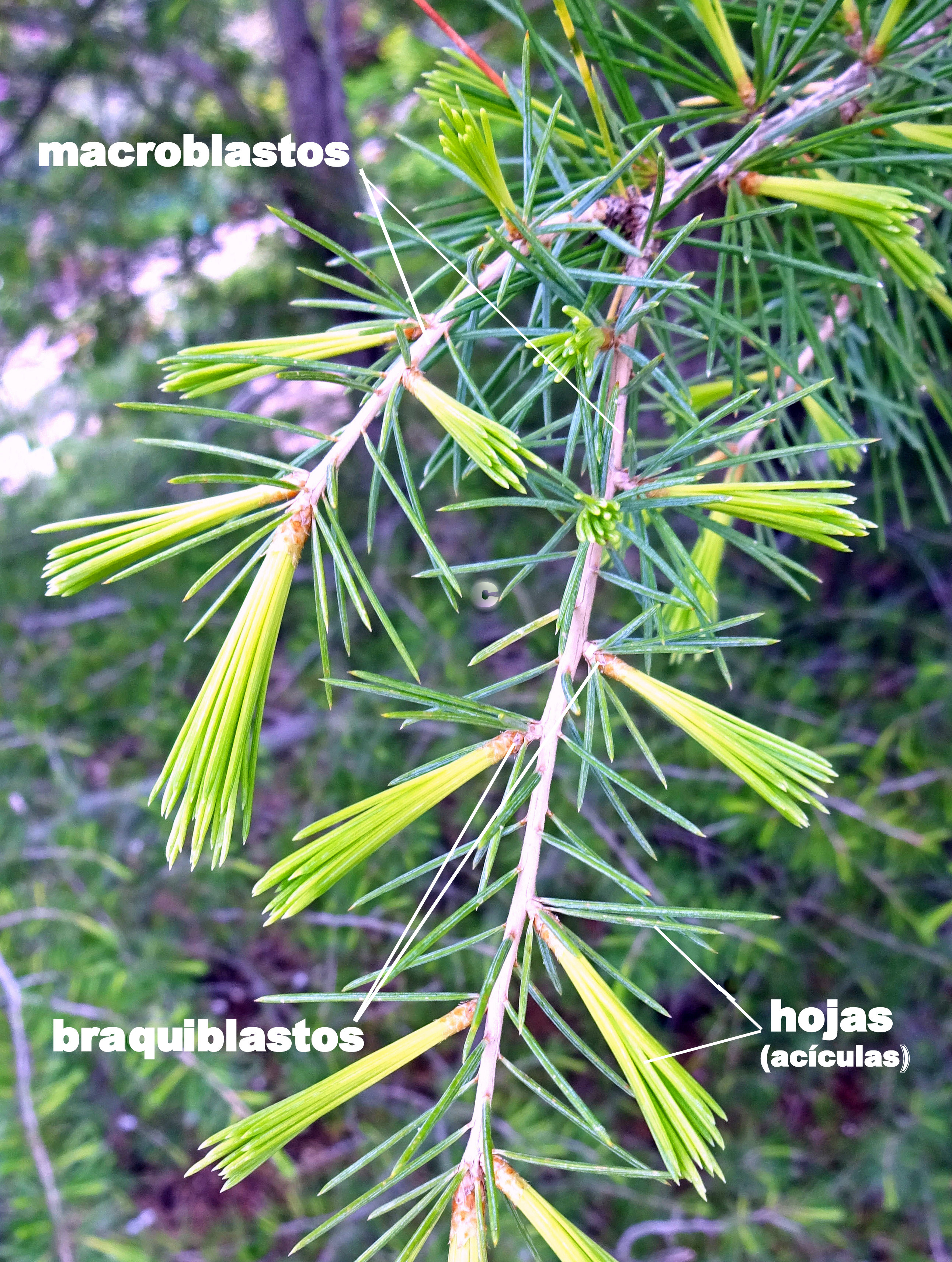 Braquiblastos, macroblastos y acículas: un ejemplo en Cedrus deodara, Pinaceae.